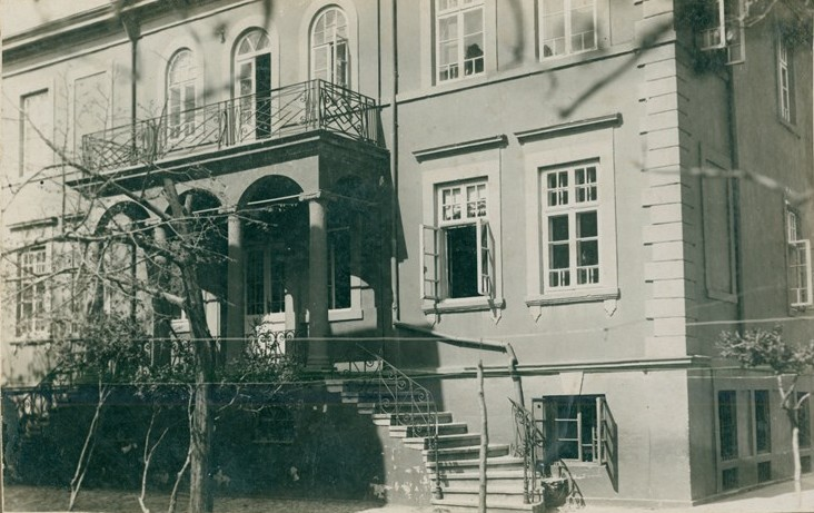 Третата сграда на Варненската девическа гимназия „Мария-Луиза“. По-късно в нея се помещава училище за глухонеми деца.